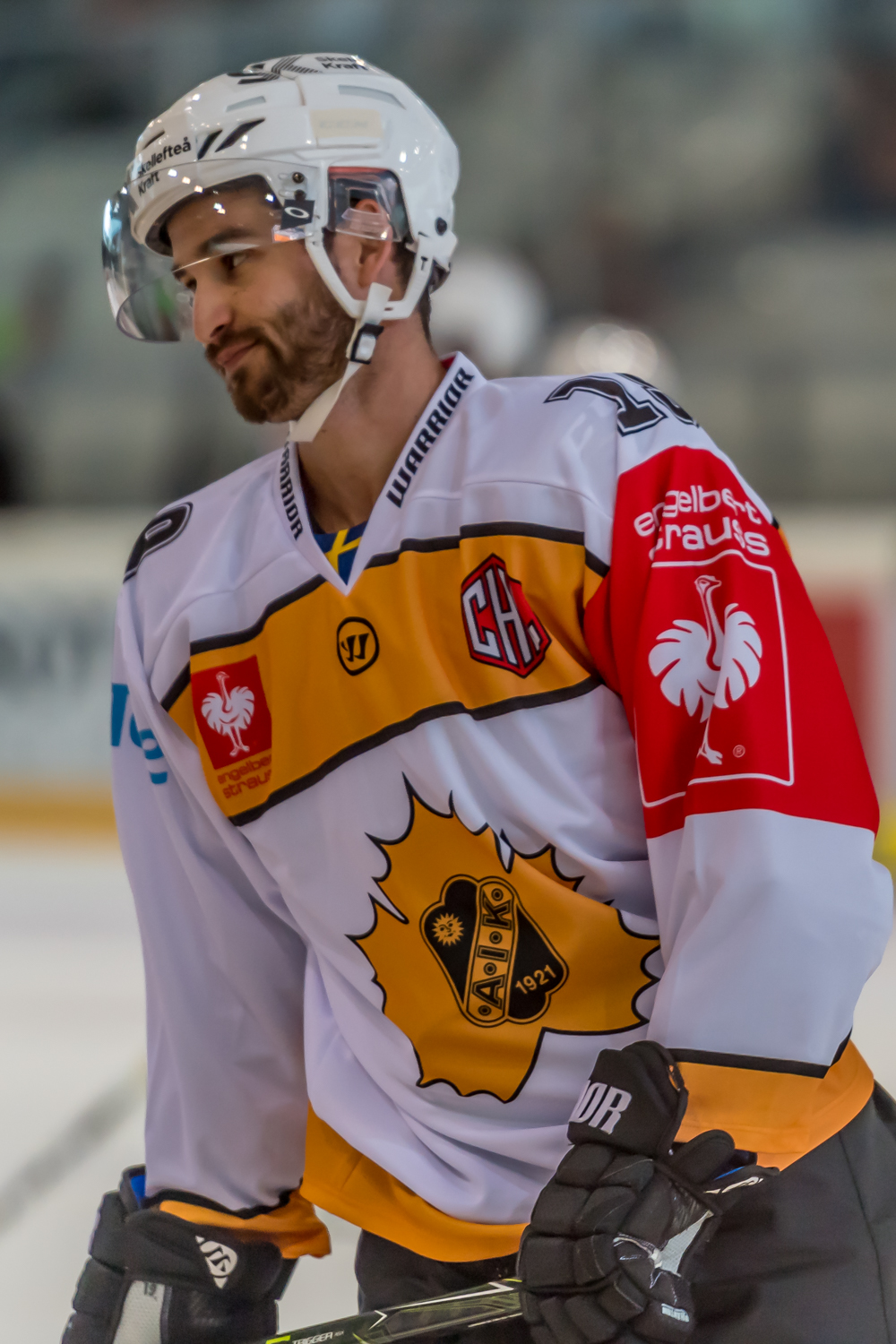 Champions Hockey League - Vienna Capitals vs Skelleftea AIK am 18.08.2016. Bild zeigt Andrew Calof (Skelleftea AIK).